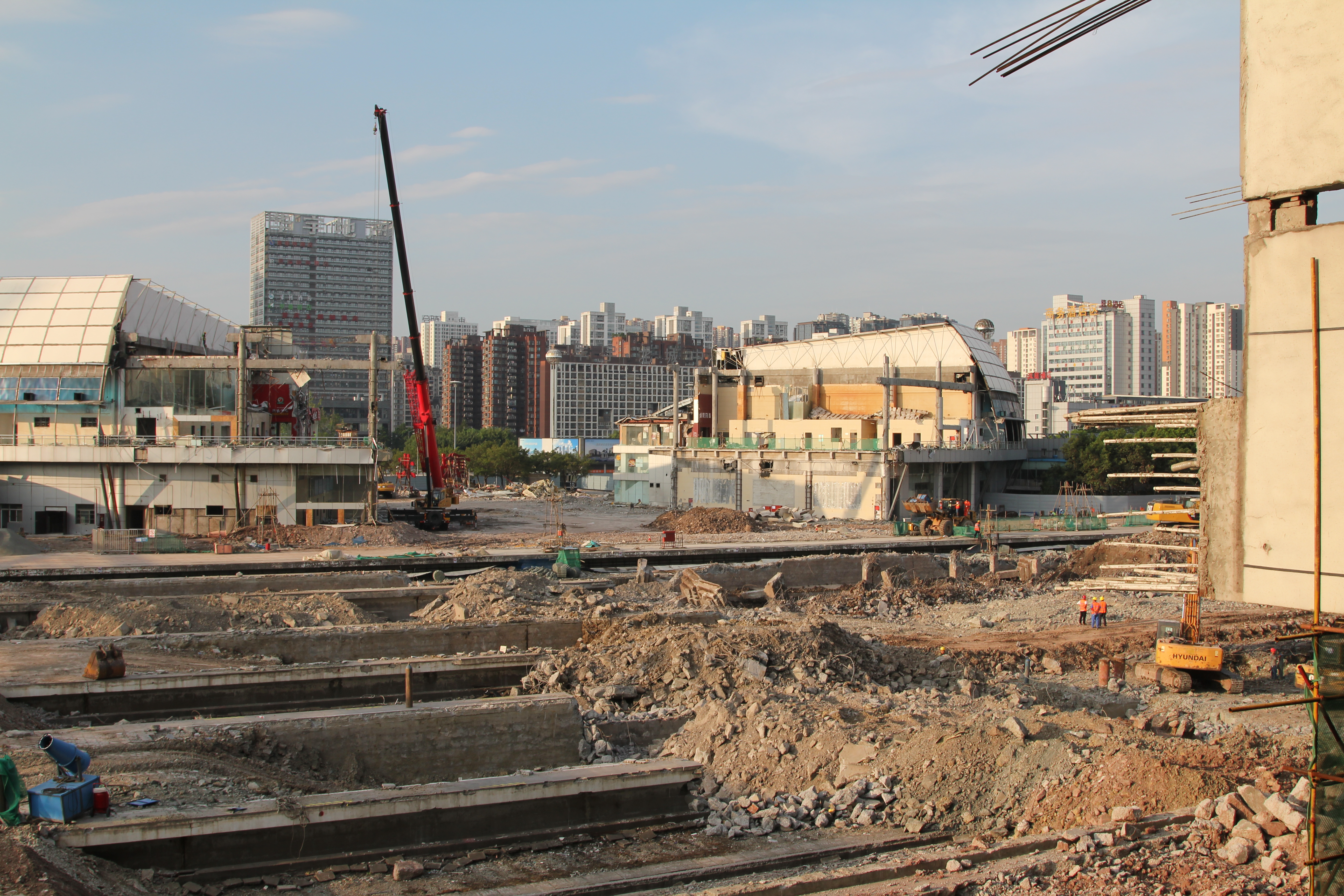 中文（中国大陆）: 重庆北站南广场拆除重建中 - 摄于 2019 年 9 月北广场 16 站台